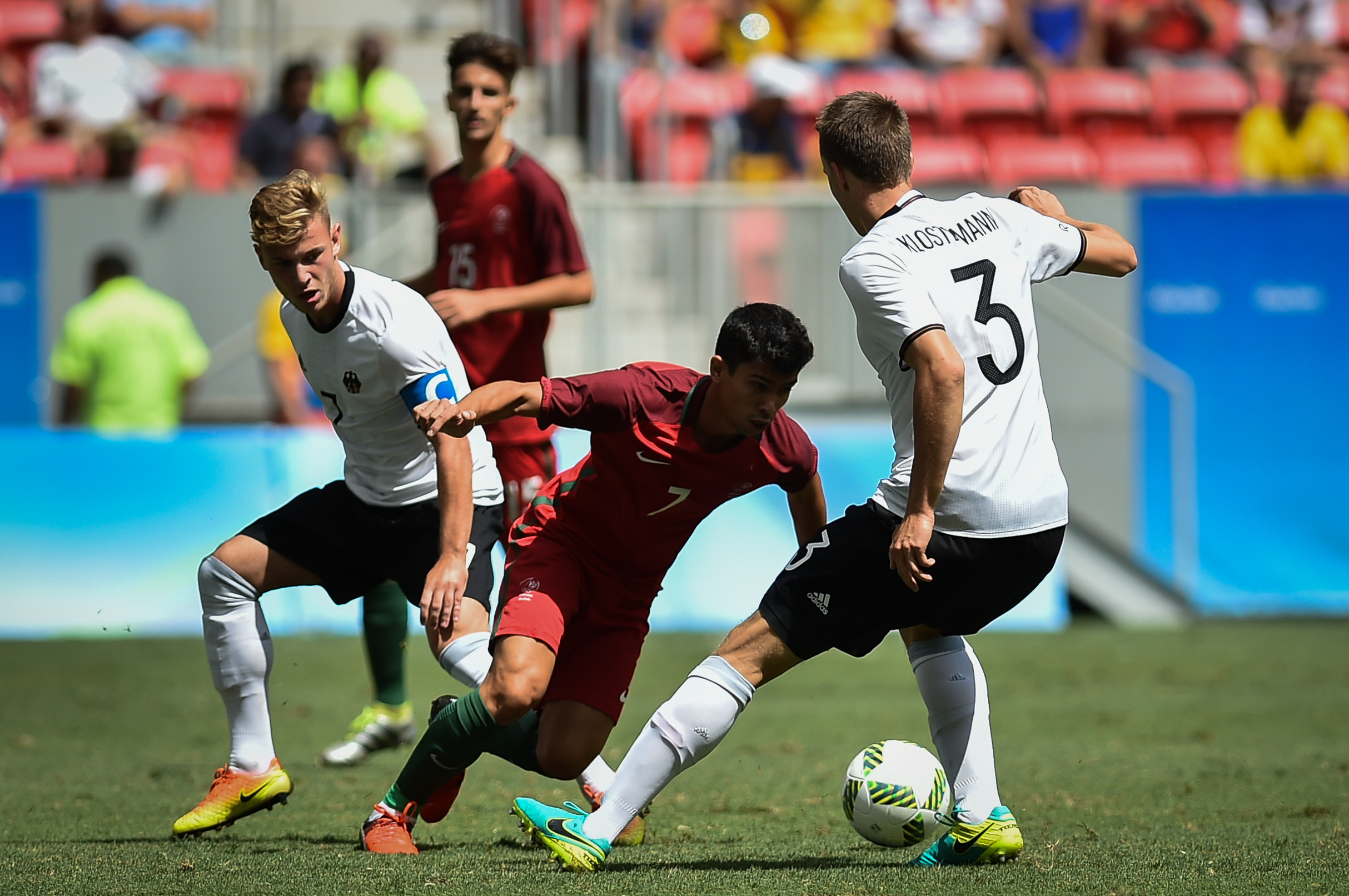 Estádio Nacional de Brasília Mané Garrincha, Brasília, DF, Brasil, 13/8/2016 Foto: Andre Borges/Agência Brasília Portigal e Alemanha jogam neste sábado (12), no Estádio Mané Garrincha, pelas quartas de final do futebol masculino nas Olimpíadas 2016.